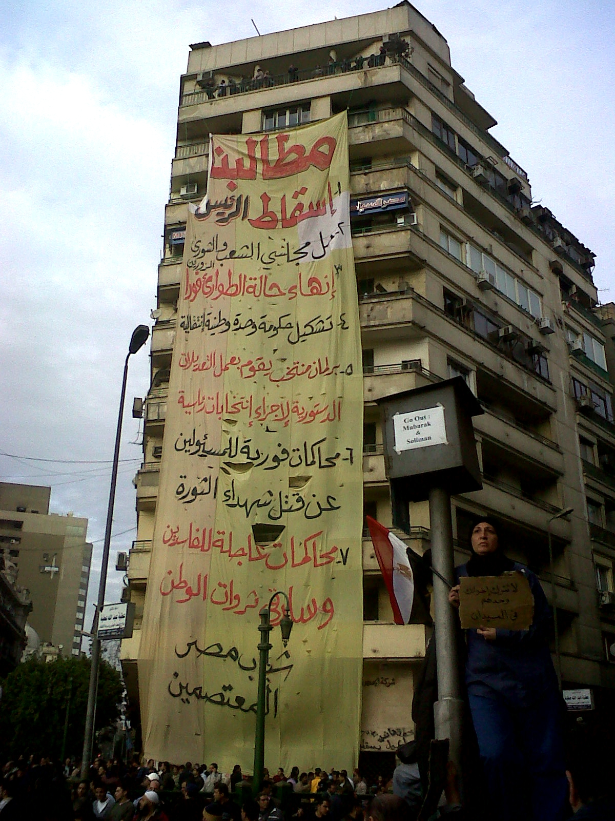 IMG01173-20110204-1628